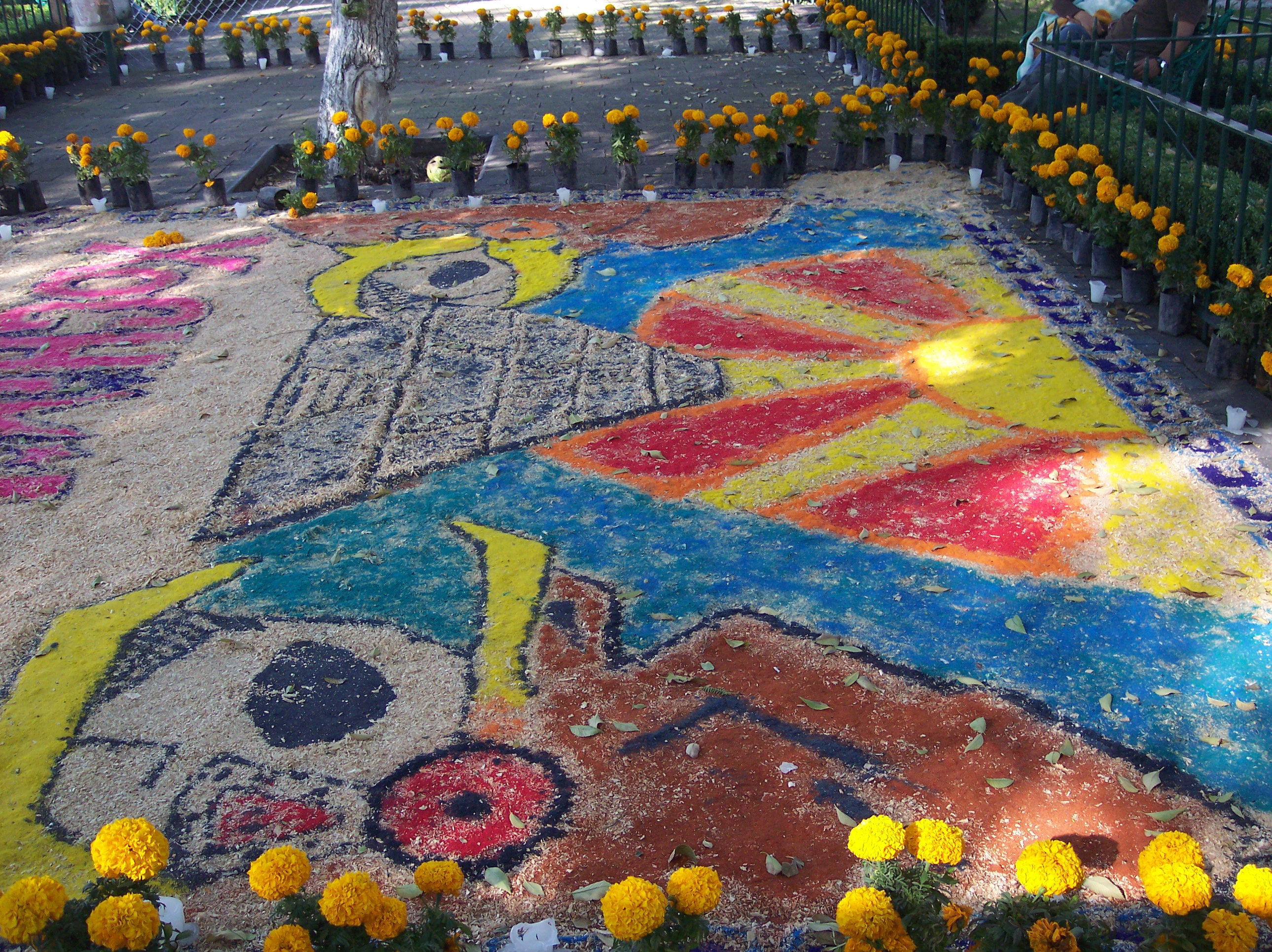 Ofrenda en el piso hecha con flores y materiales naturales. Obra hecha por alumnos del CCH Sur de la UNAM. Photo taken in Xochimilco, D. F. Mexico. November the 2nd, Day of Deads, a tradicional celebration in Mexico. SPANISH: Fotos tomadas en Xochimilco con motivo del día de muertos (2 de Noviembre) año 2006.